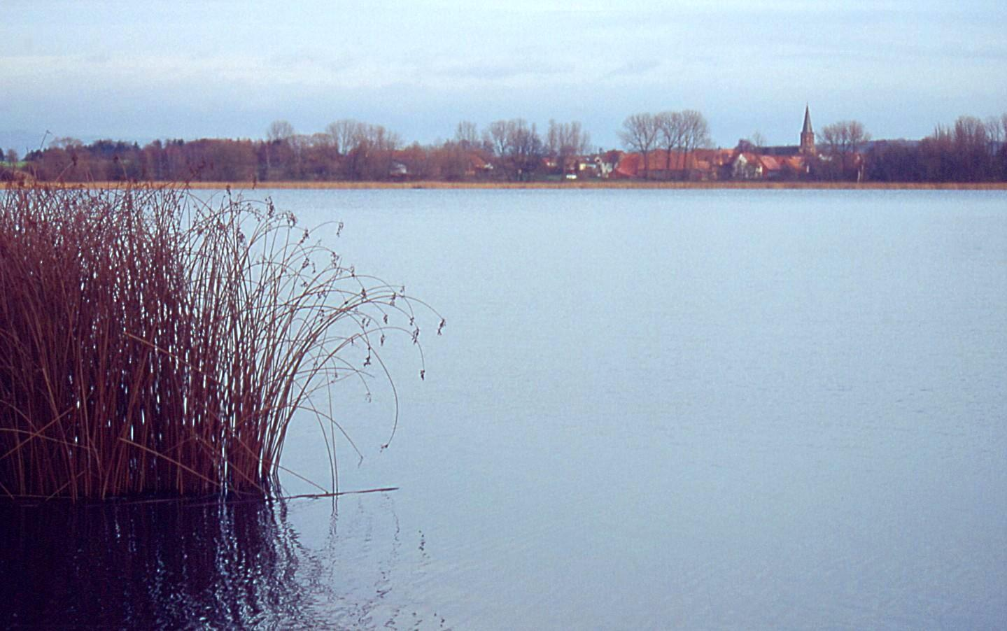 Winterstimmung am Seeburger See im Unter-Eichsfeld, gesehen vom Westufer aus. Im Hintergrund der Ort Bernshausen.